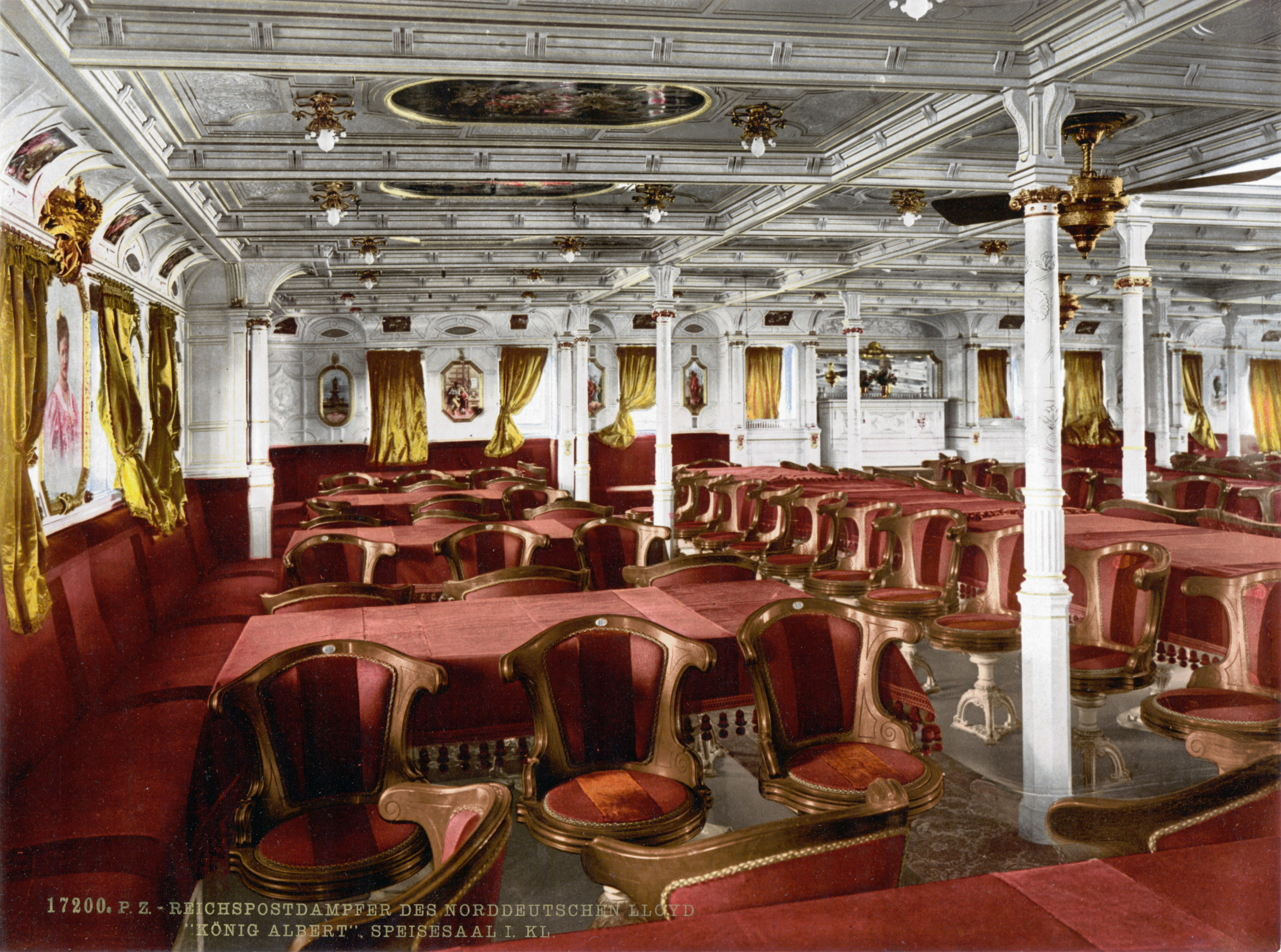 Norddeutscher LLoyd, Reichspostdampfer „König Albert“, Speisesaal 1. Klasse.